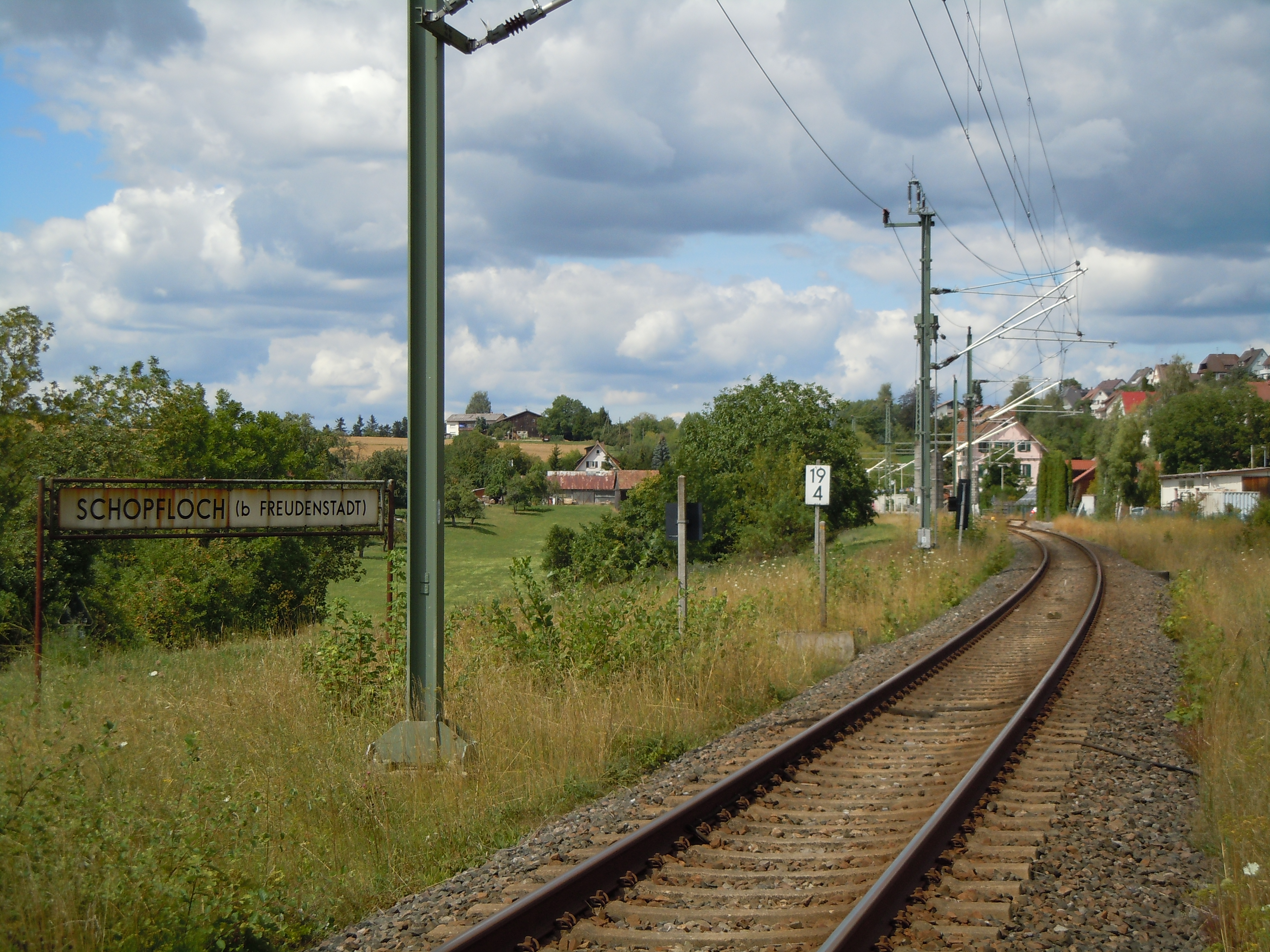 Der südliche Teil des Bahndamms bei Schopfloch (Schwarzwald) gehört zum FFH-Gebiet "Freudenstädter Heckengäu" (Schutzgebietskennung DE-7516-341).